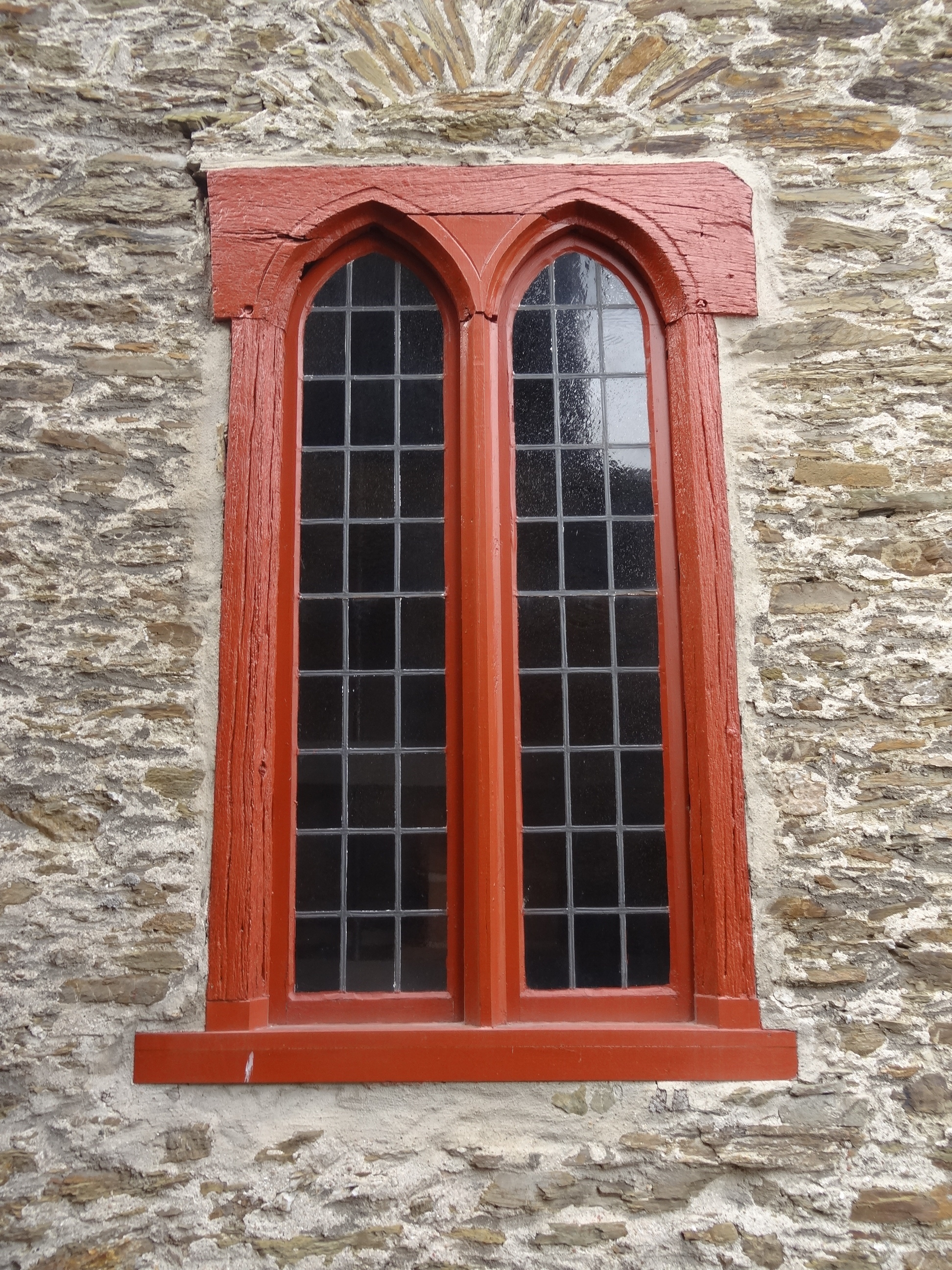 Evangelische Kirche Cleeberg